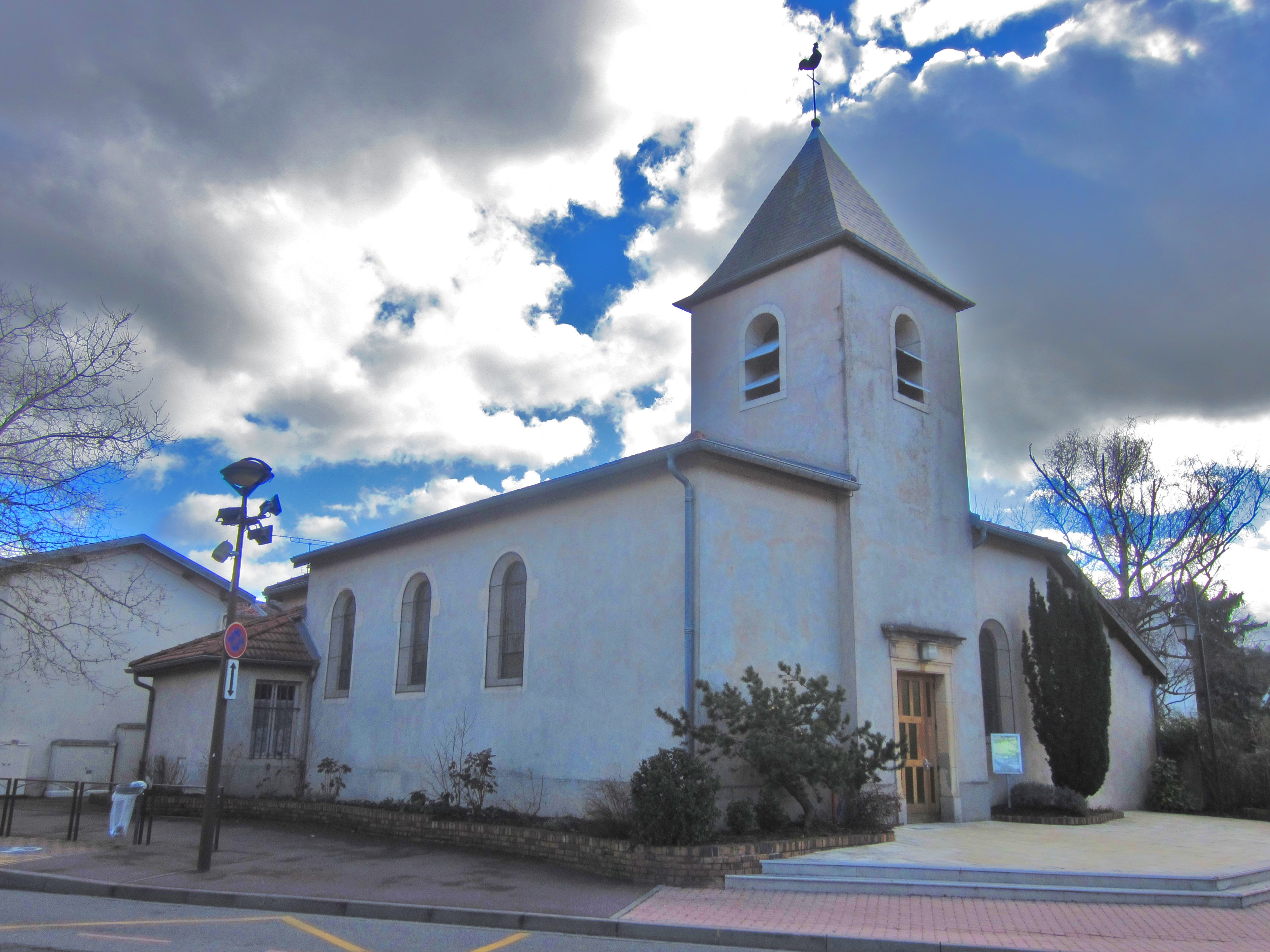 Pulnoy eglise